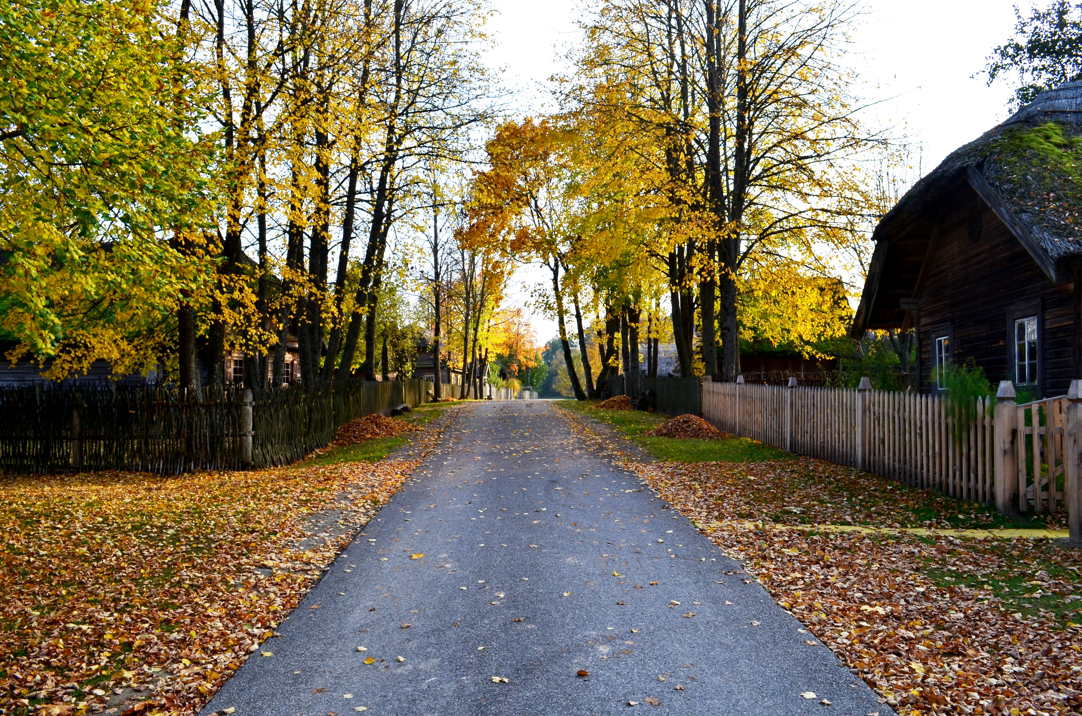 Aukštaičių kaimas (dešinėje - pirkia iš Sėlės), Rumšiškių muziejus